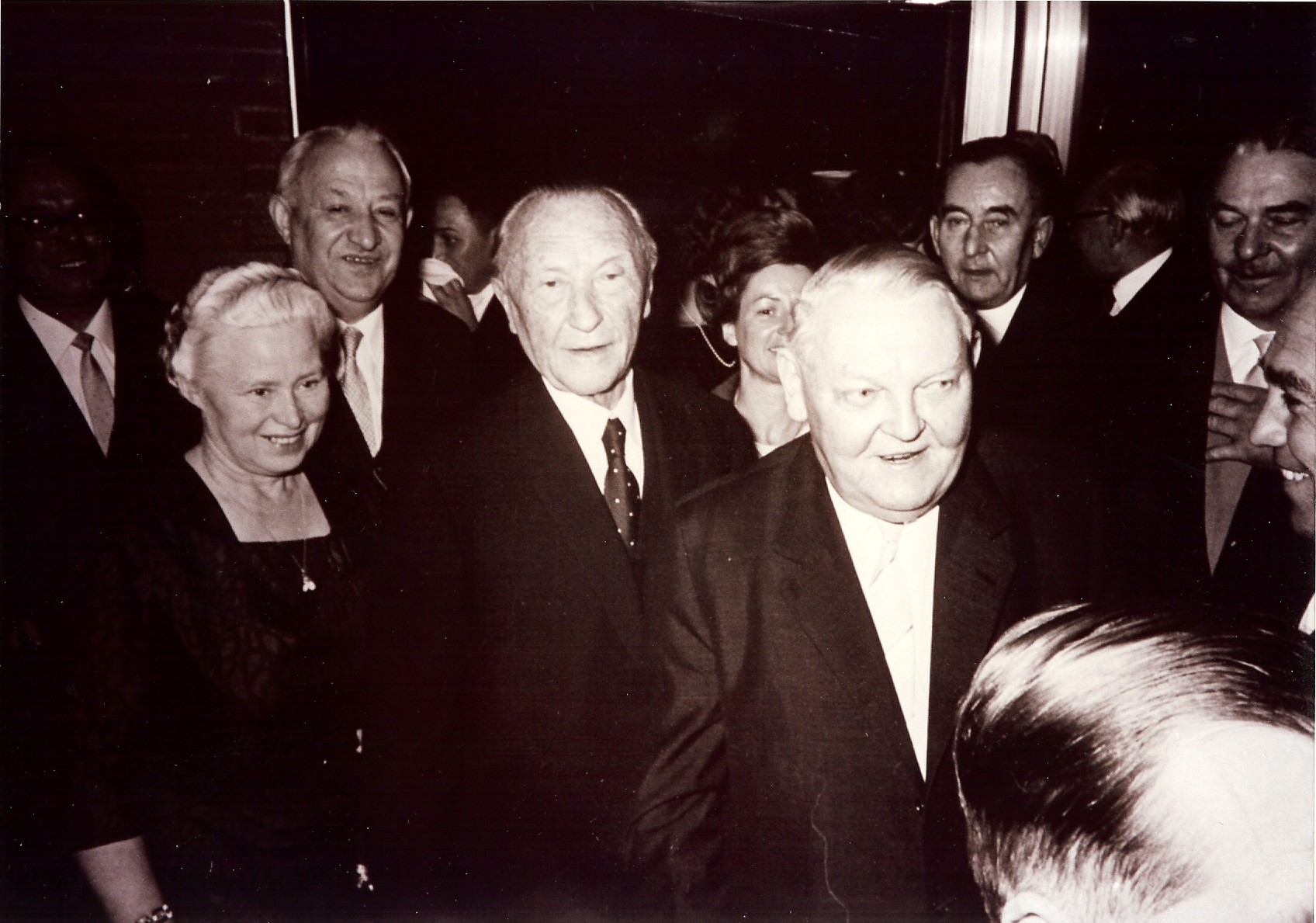 Wilhem Brese li. im Bild hinter Ehefrau Martha, re. Konrad Adenauer und Ludwig Erhardt